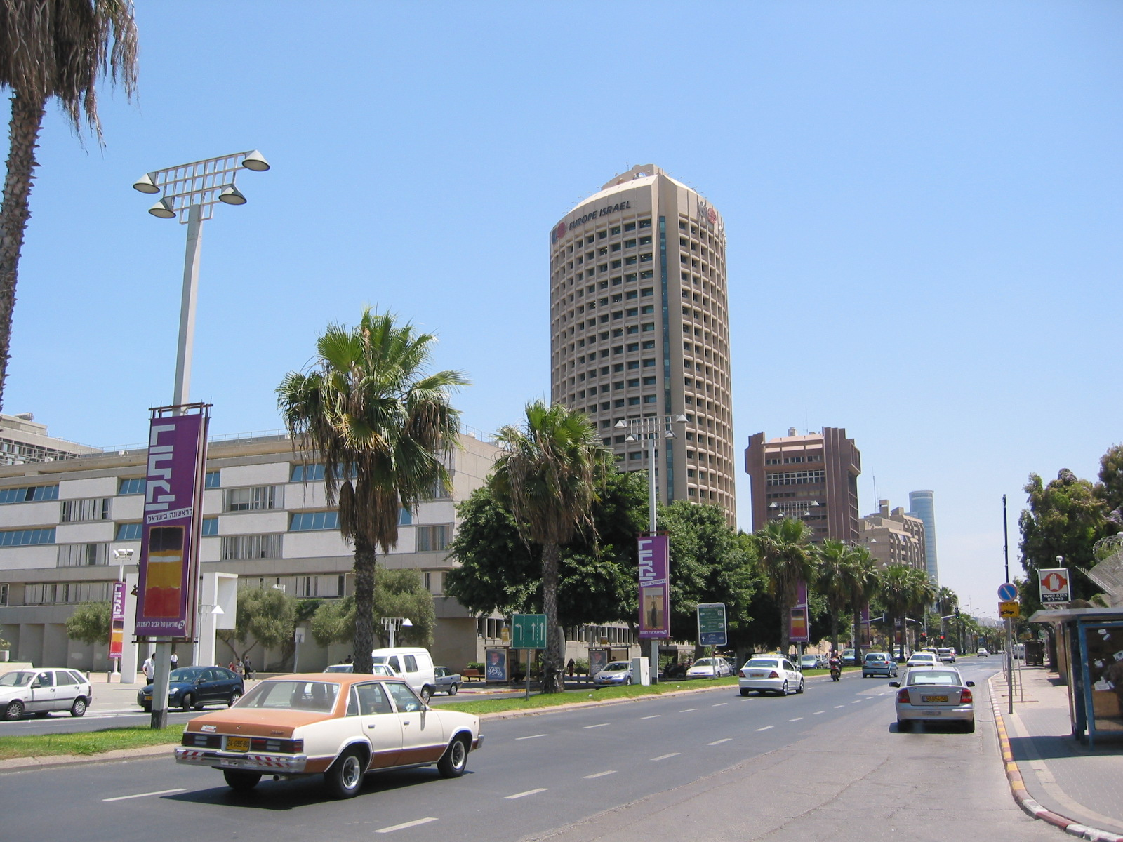 Shaul Hamelech Street, Tel Aviv